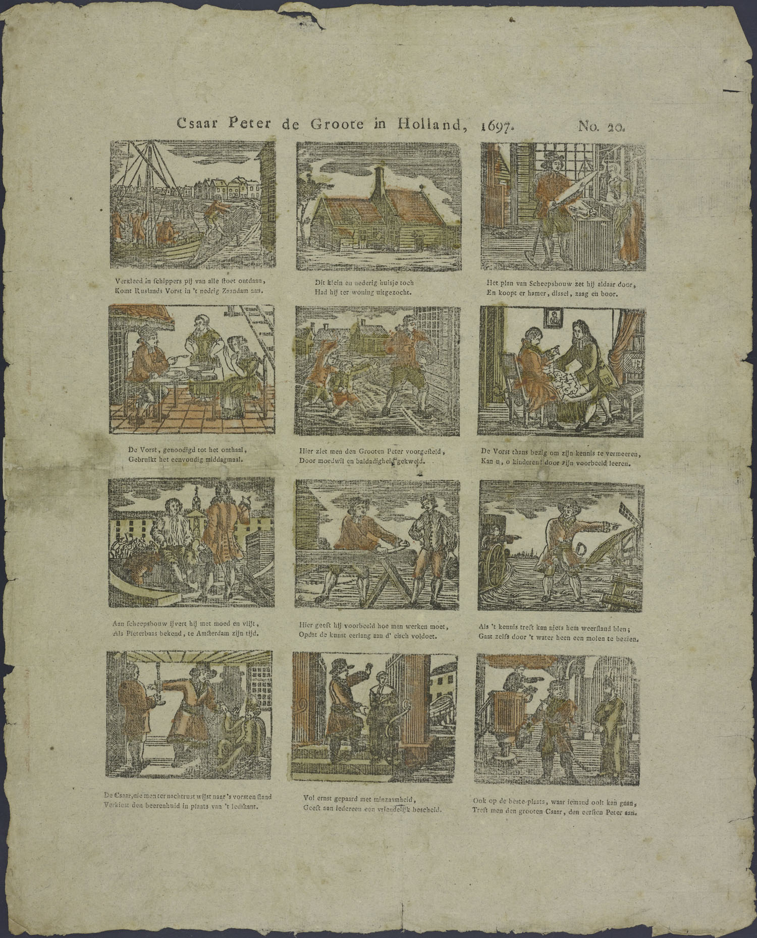 Centsprent met 4 x 3 omkaderde houtsneden, met afbeeldingen van de aankomst van de Russische vorst in Zaandam, zijn nederige huisje, hij koopt gereedschap voor scheepsbouw, eet bij de inwoners, wordt geplaagd door de jeugd, vermeerdert zijn kennis, werkt in Amsterdam in de scheepsbouw, bekijkt een molen, slaapt onder een berenvel, is vriendelijk voor iedereen en gaat ook naar de kerk. Bevat tweeregelige rijmende onderschriften.